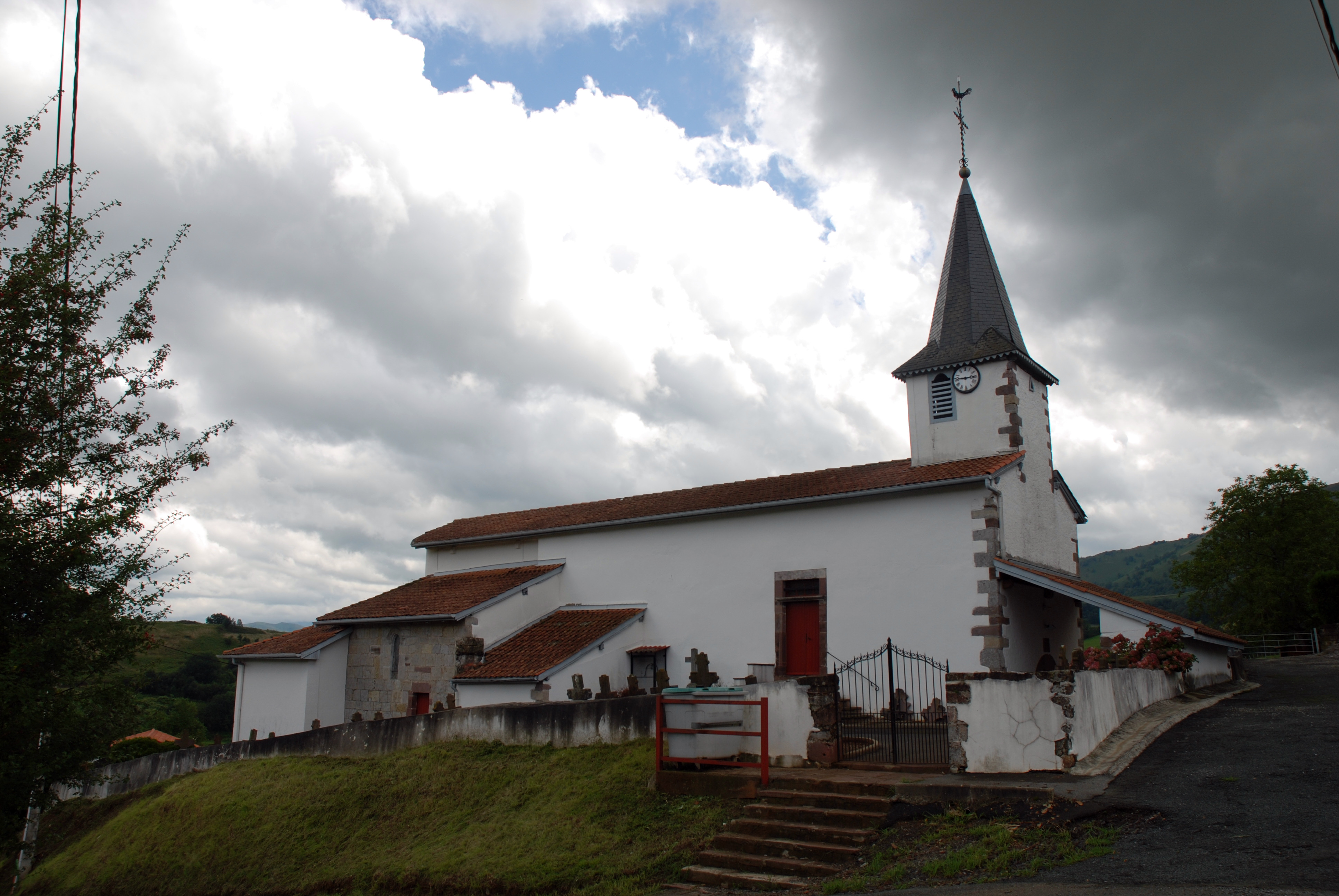 Anhaux - Eglise Saint-Jean-Baptiste